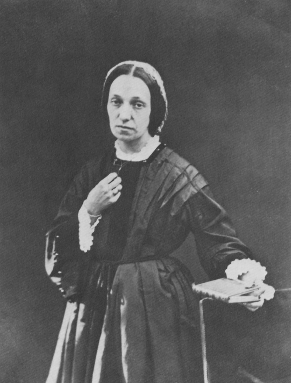 Somers, Lord: Porträt Julia Margaret Cameron